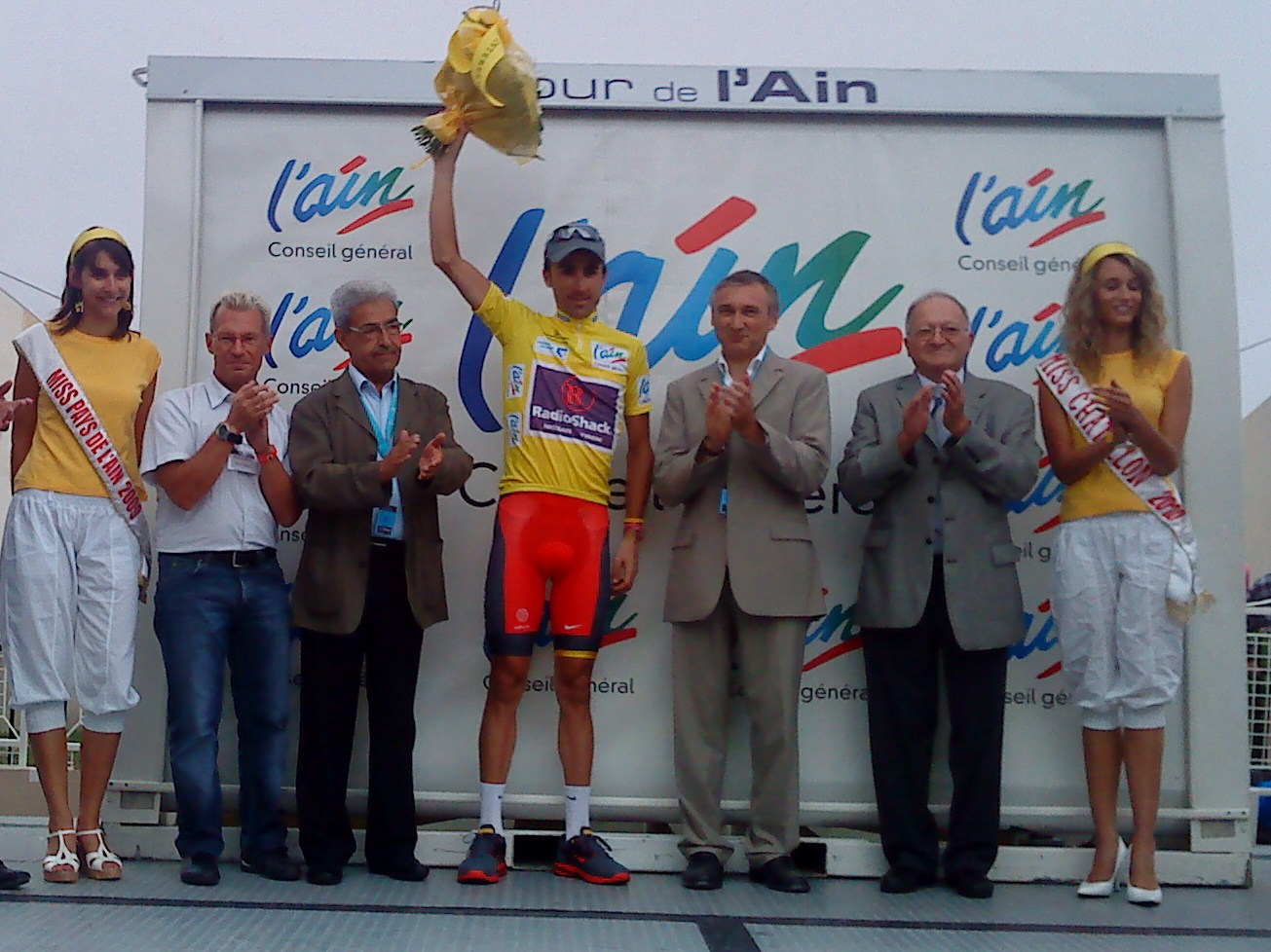 Classement final du Tour de l'Ain 2010 : maillot jaune remporté par Haimar Zubeldia